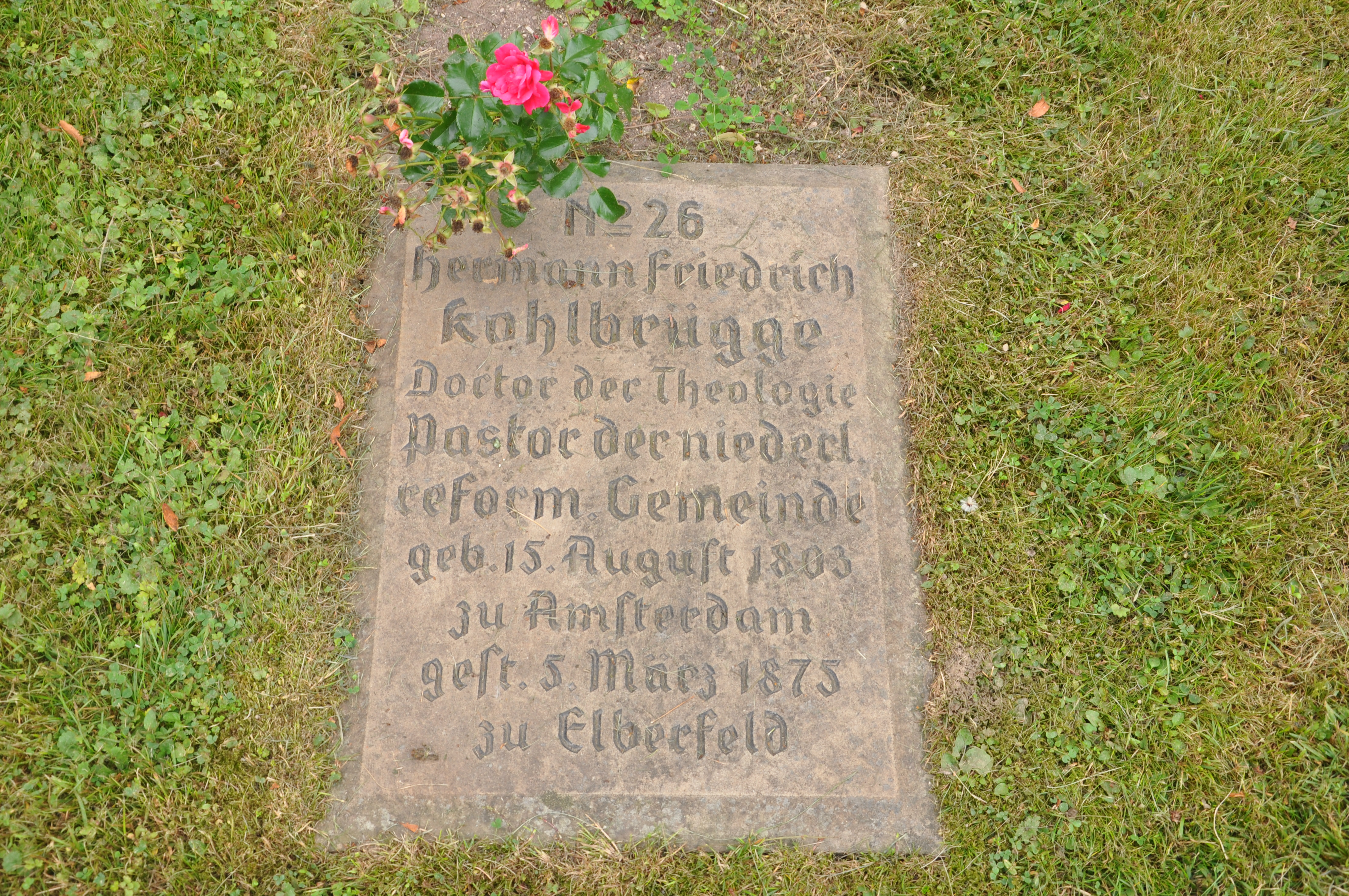 Niederländisch-reformierter Friedhof, Wuppertal